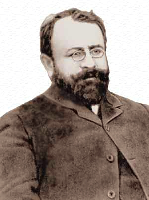 Гессен, Владимир Матвеевич (1868-1920)